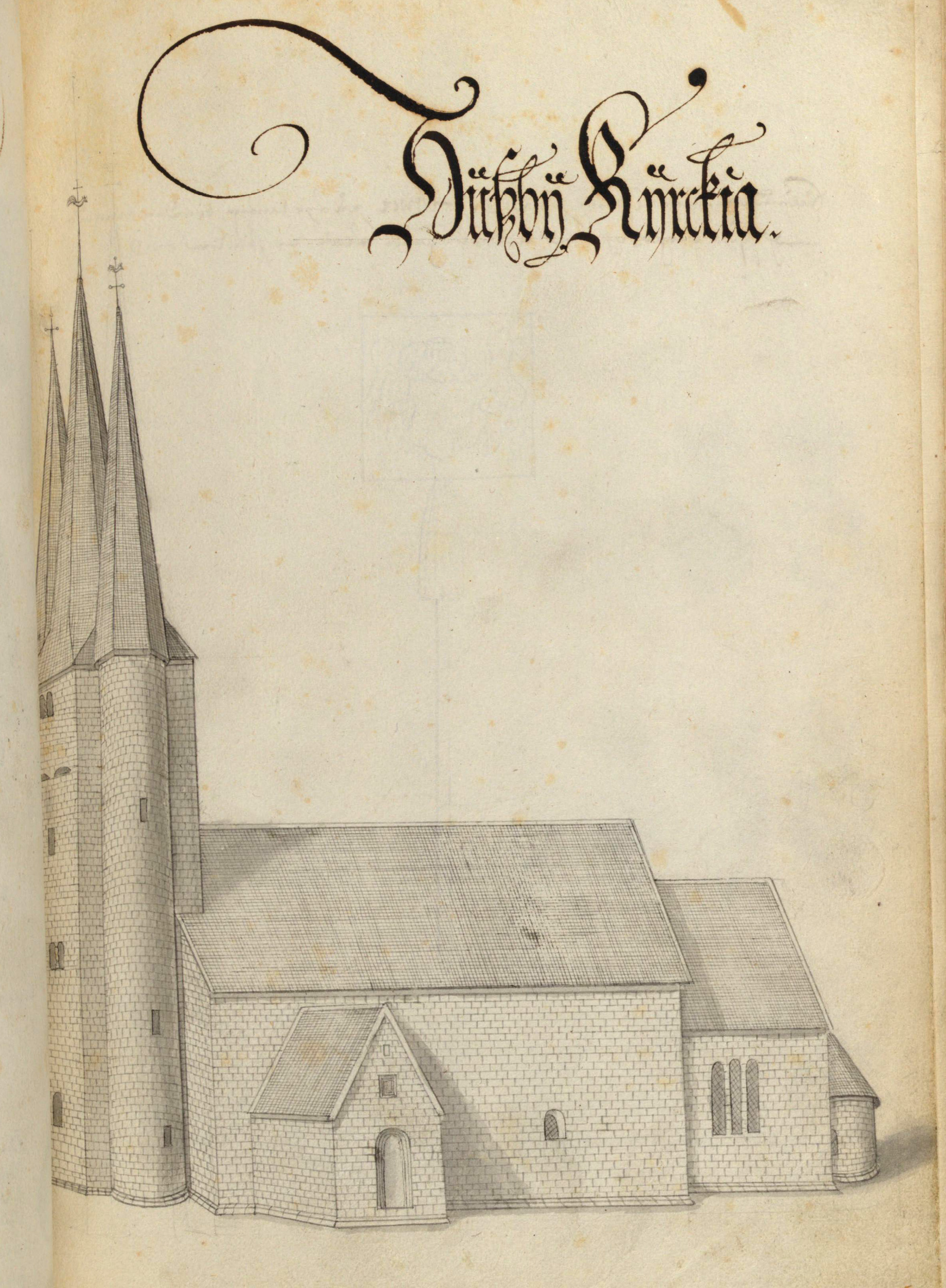 Husaby kyrka. Kyrka, äldre, teckning ur Peringskiölds Monumenta, avfotograferad i färg.